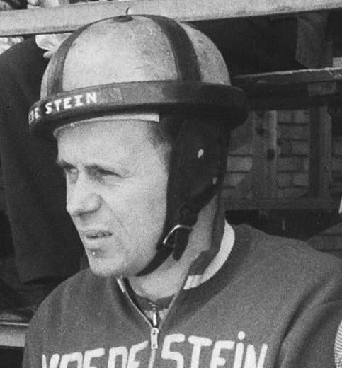 Collectie / Archief : Fotocollectie Anefo Reportage / Serie : [ onbekend ] Beschrijving : Voorbereidingen voor de wereldkampioenschap wielrennen v.l.n.r. de stayers De Paepe , Wierstra en Timoner Datum : 6 augustus 1959 Fotograaf : Noske, J.D. / Anefo Auteursrechthebbende : Nationaal Archief Materiaalsoort : Negatief (zwart/wit) Nummer archiefinventaris : bekijk toegang 2.24.01.03 Bestanddeelnummer : 910-5731